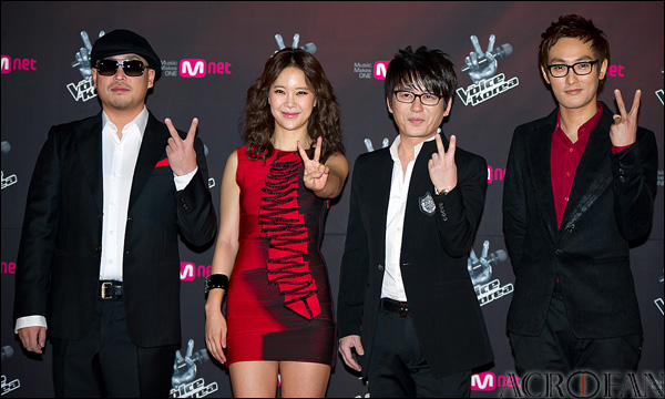 보이스코리아 코치진. '보이스코리아' 제작발표 및 하이라이트 시사회에서